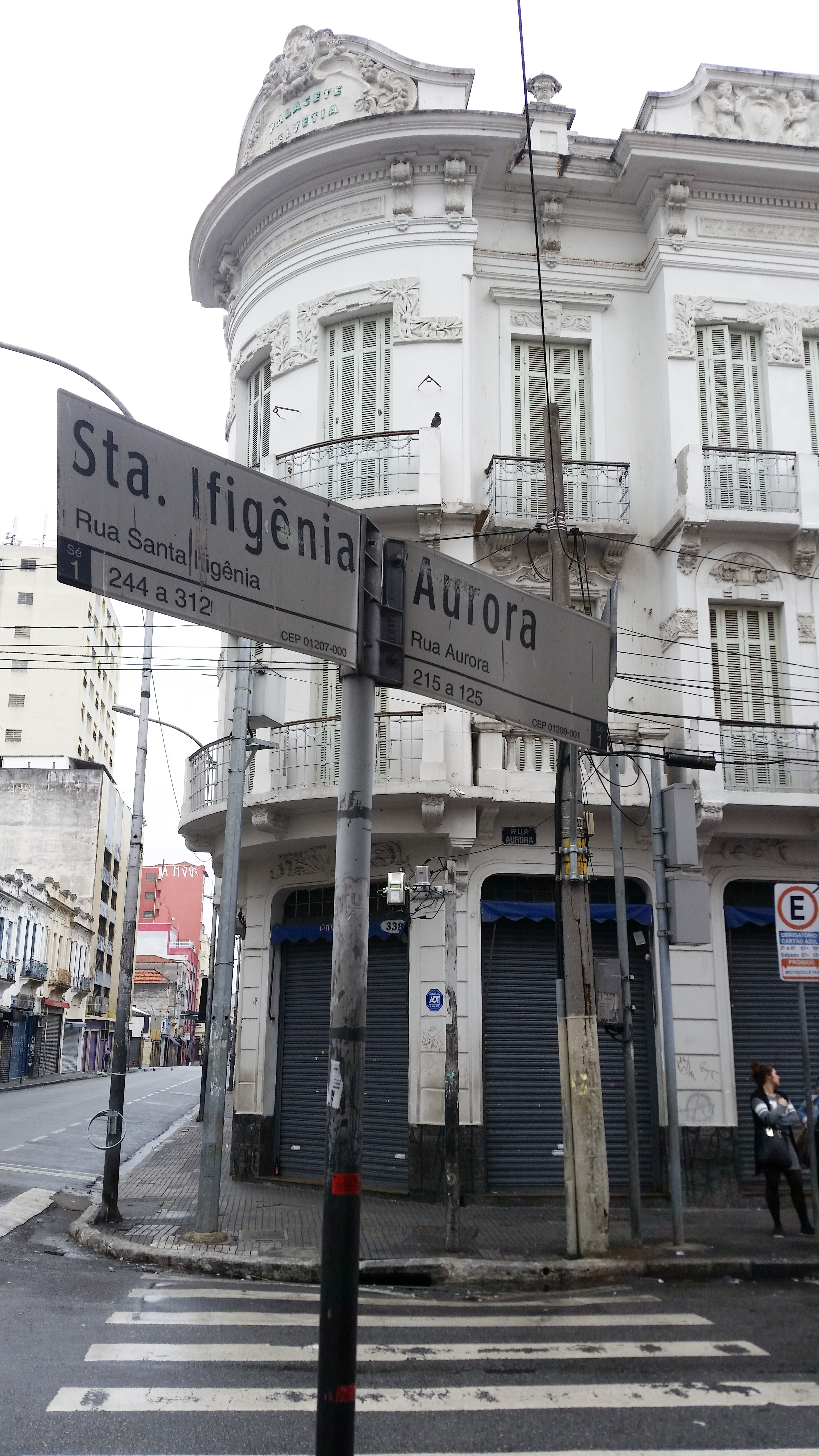 Palacete, visto da esquina da Rua Aurora com a Santa Ifigênia, em São Paulo (SP)